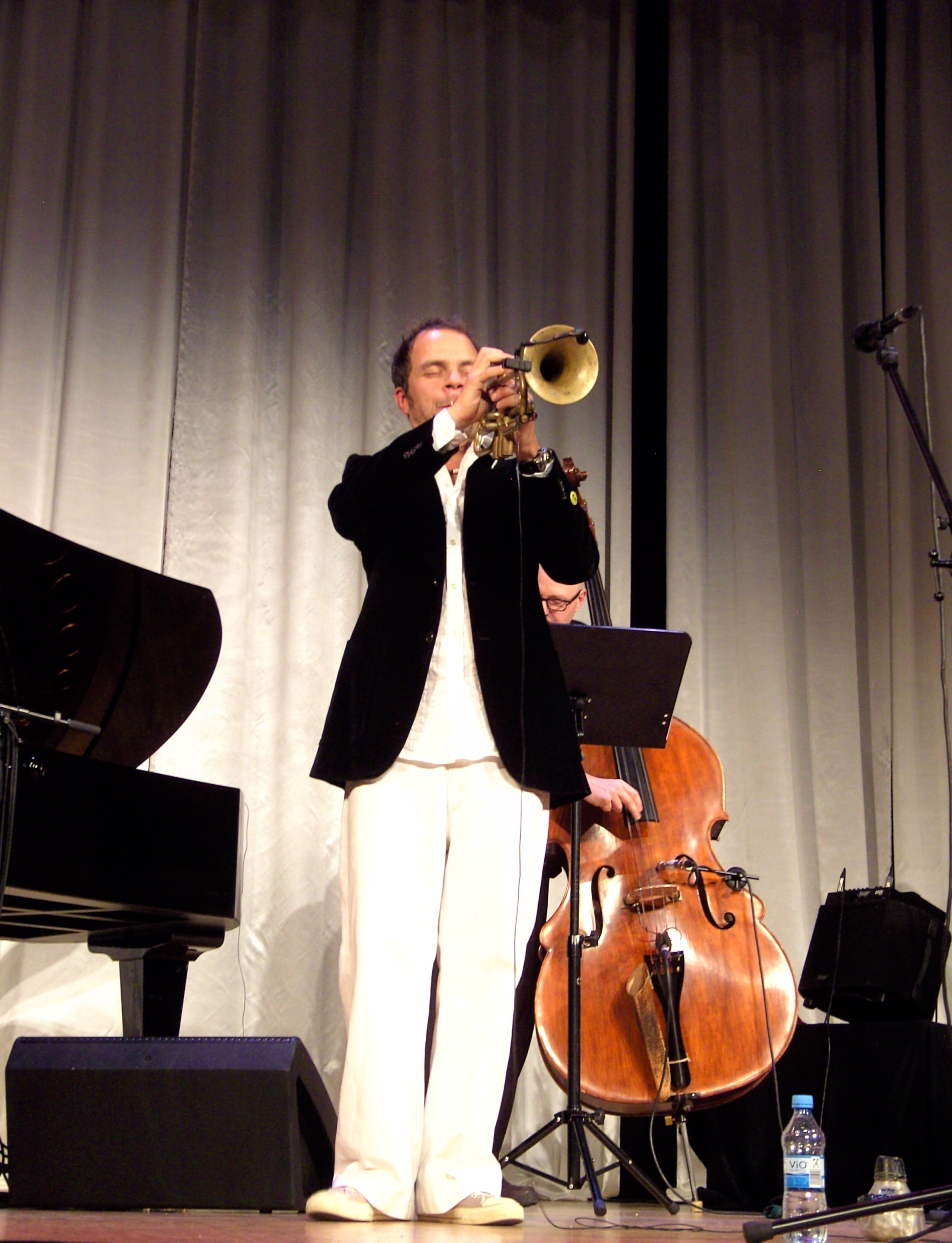 Der Jazztrompeter Joo Kraus während eines Konzerts im Atrium von Vilshofen an der Donau im Rahmen der Konzertreihe Herbstlaub im November 2010.